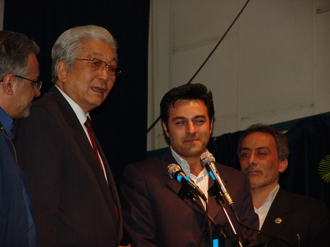 بنیانگذاران ای تی اف تکوان-دو ایران، اساتید حسین فرید صباغ و جاوید شاهوردی سال 2008 سمینار تهران با حضور پرفسور چانگ اونگ